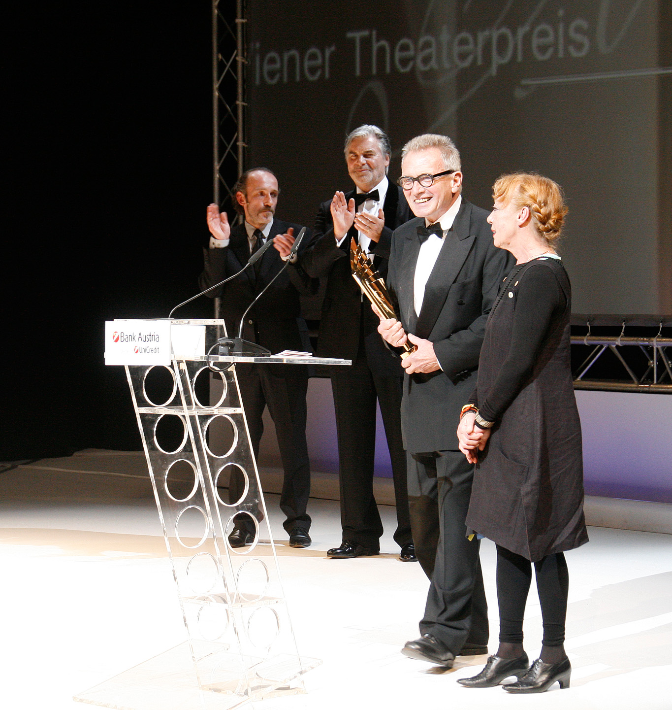 Ulrike Kaufmann und Erwin Piplits, als Leiter des Serapionstheaters für ihr Lebenswerk geehrt, mit Laudator Karl Markovics und Moderator Peter Simonischek bei der Verleihung des Nestroy-Theaterpreises 2010 im Burgtheater in Wien.